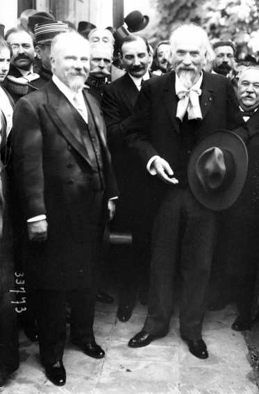 Raymond Poincaré (1854-1934) et Frédéric Mistral (1830-1904) à Maillane en 1913